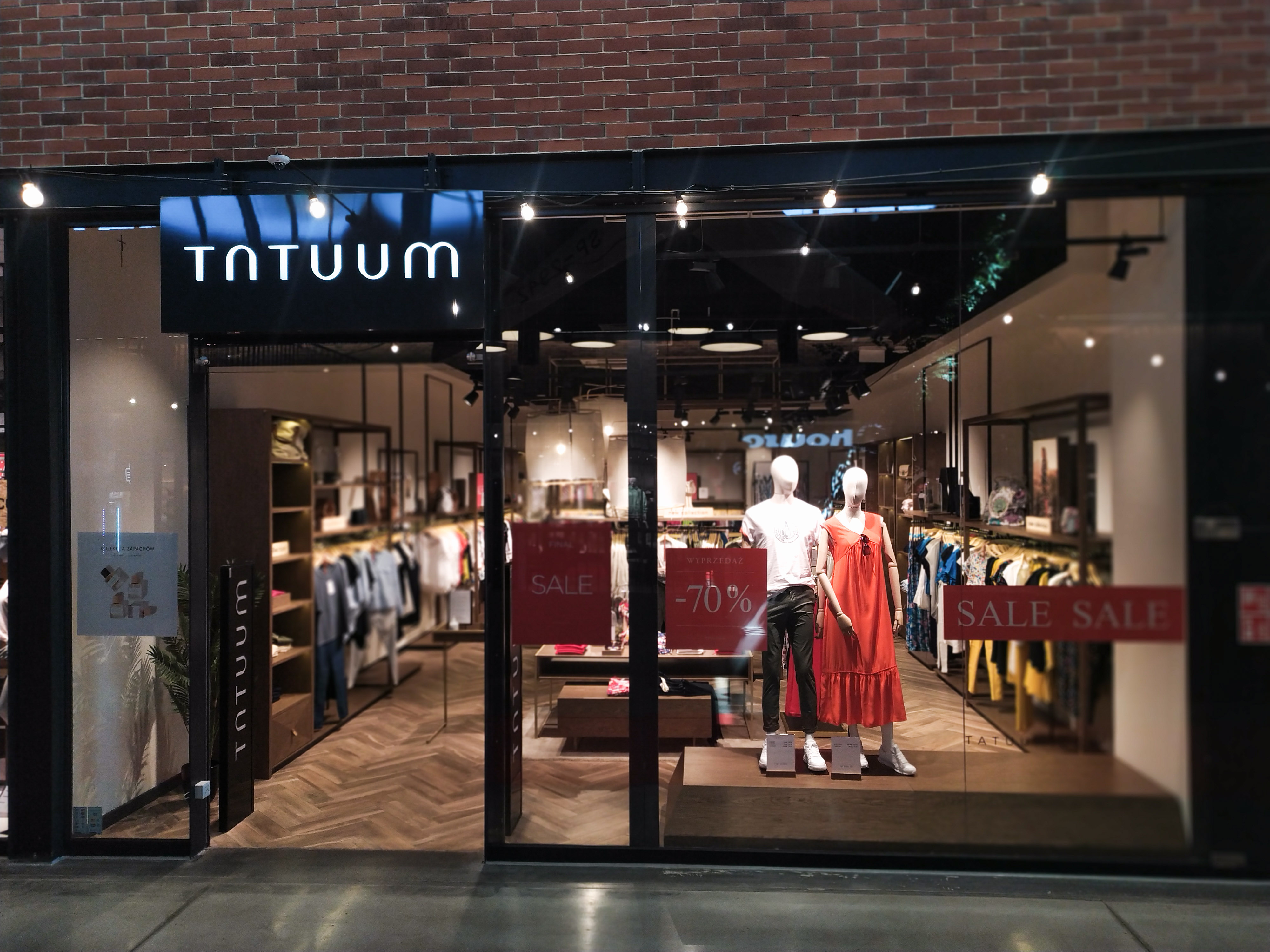 Pierwszy sklep Tatuuum w Pabianicach